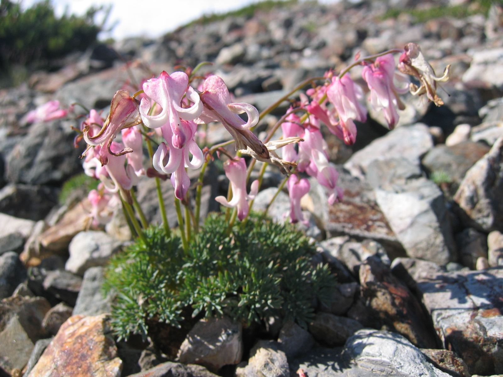 コマクサ